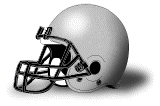 Casco de Badalona Dracs